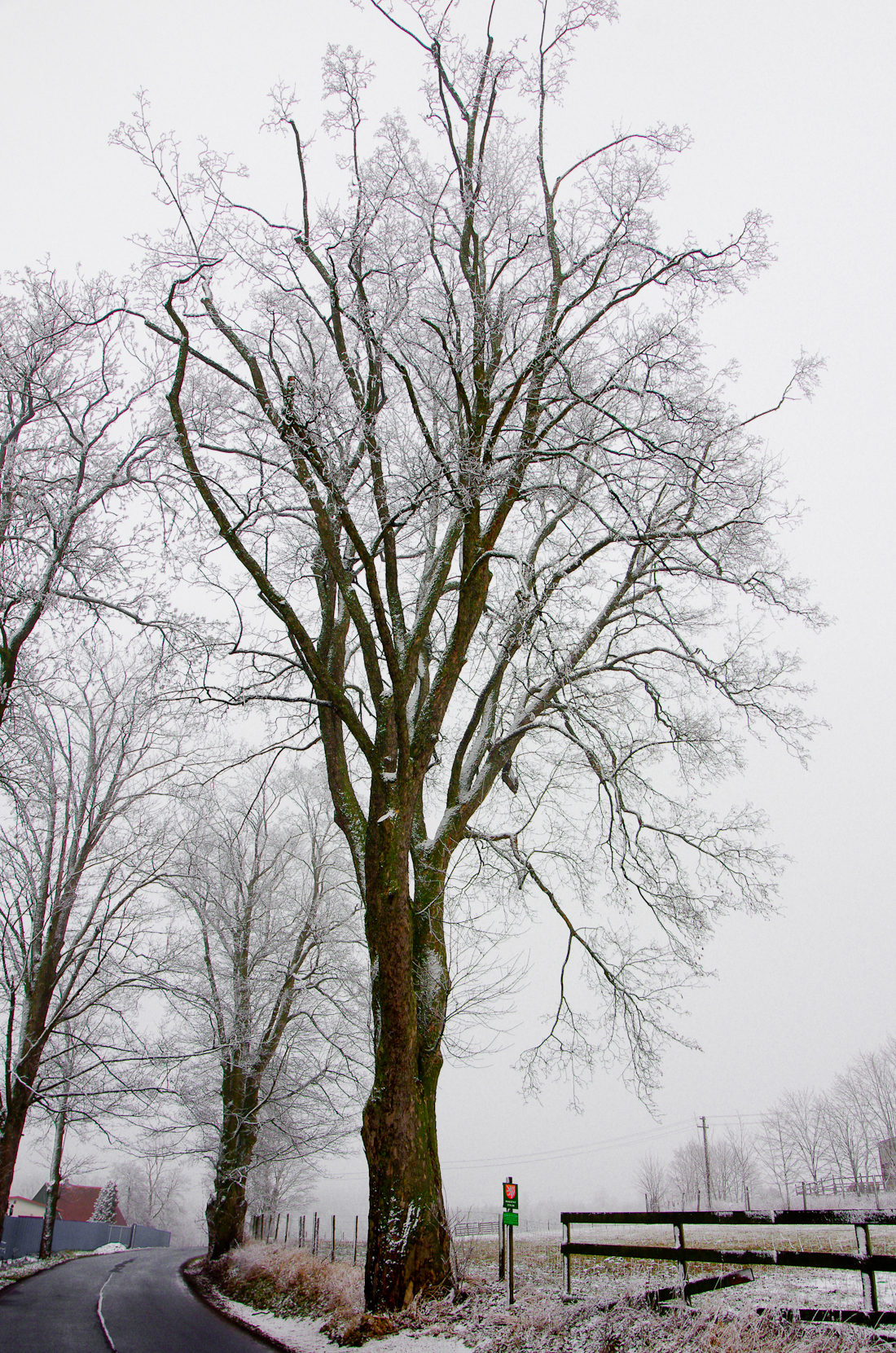 Jindřichovice, okres Sokolov, Krušné hory, jindřichovický klen - památný strom na severním konci obce, vpravo u silnice č. 219 mezi jindřichovickým zámkem a vstupem do bývalé obory SSV od obce; výška 25 m, obvod kmene 455 cm (údaje z roku 2004)